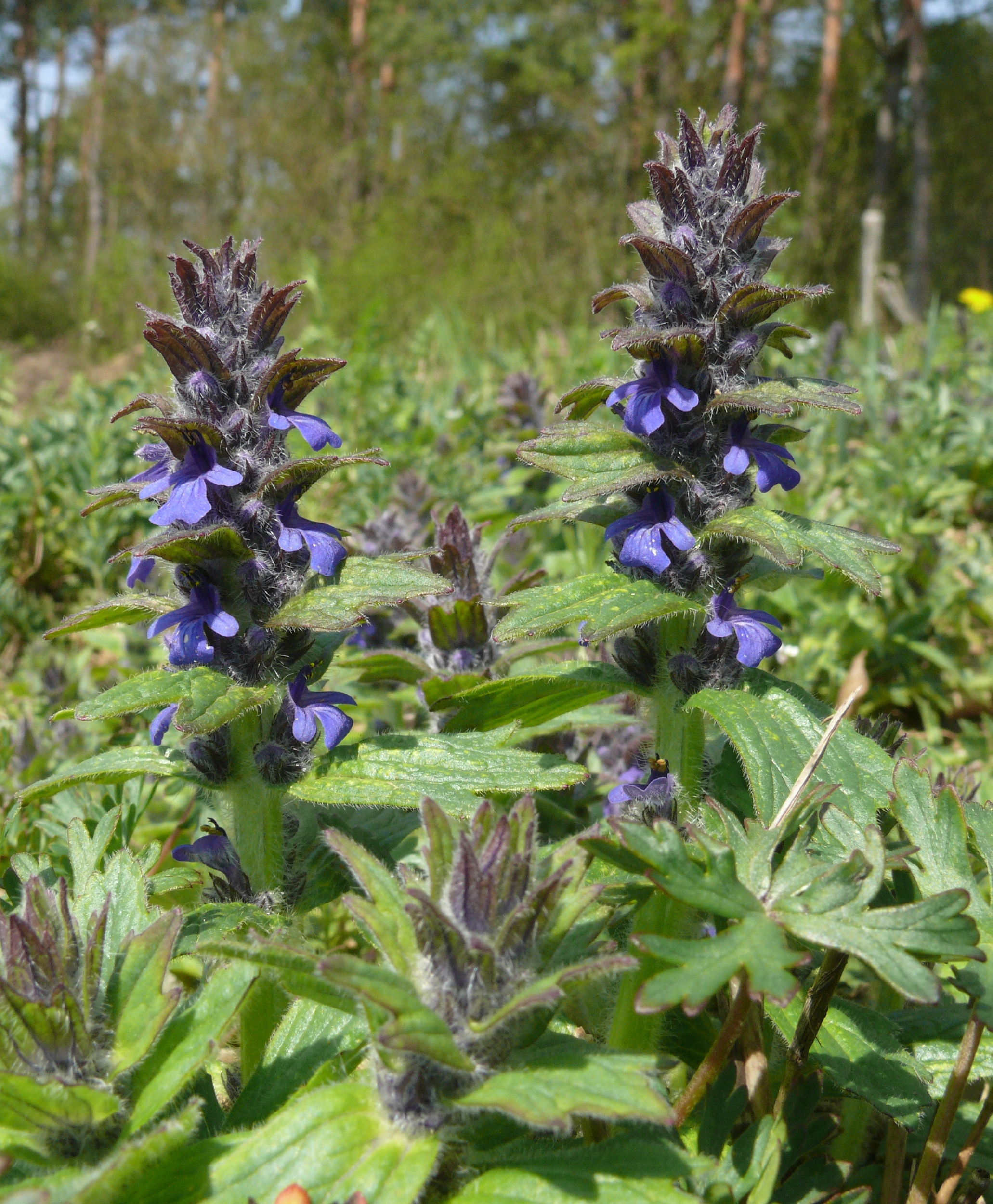 Ajuga genevensis, Tauberland, Deutschland